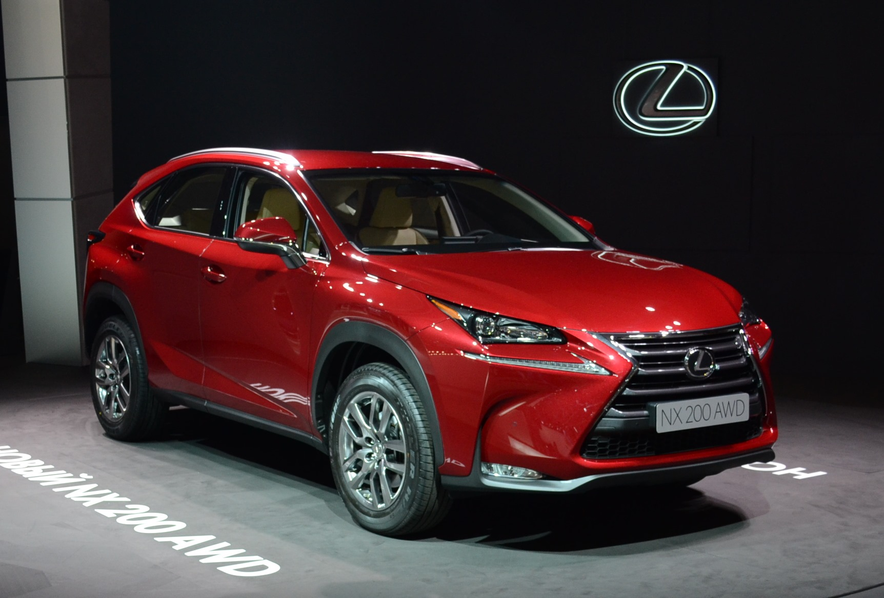 Кроссовер Lexus NX 200 на Московском автосалоне 2014